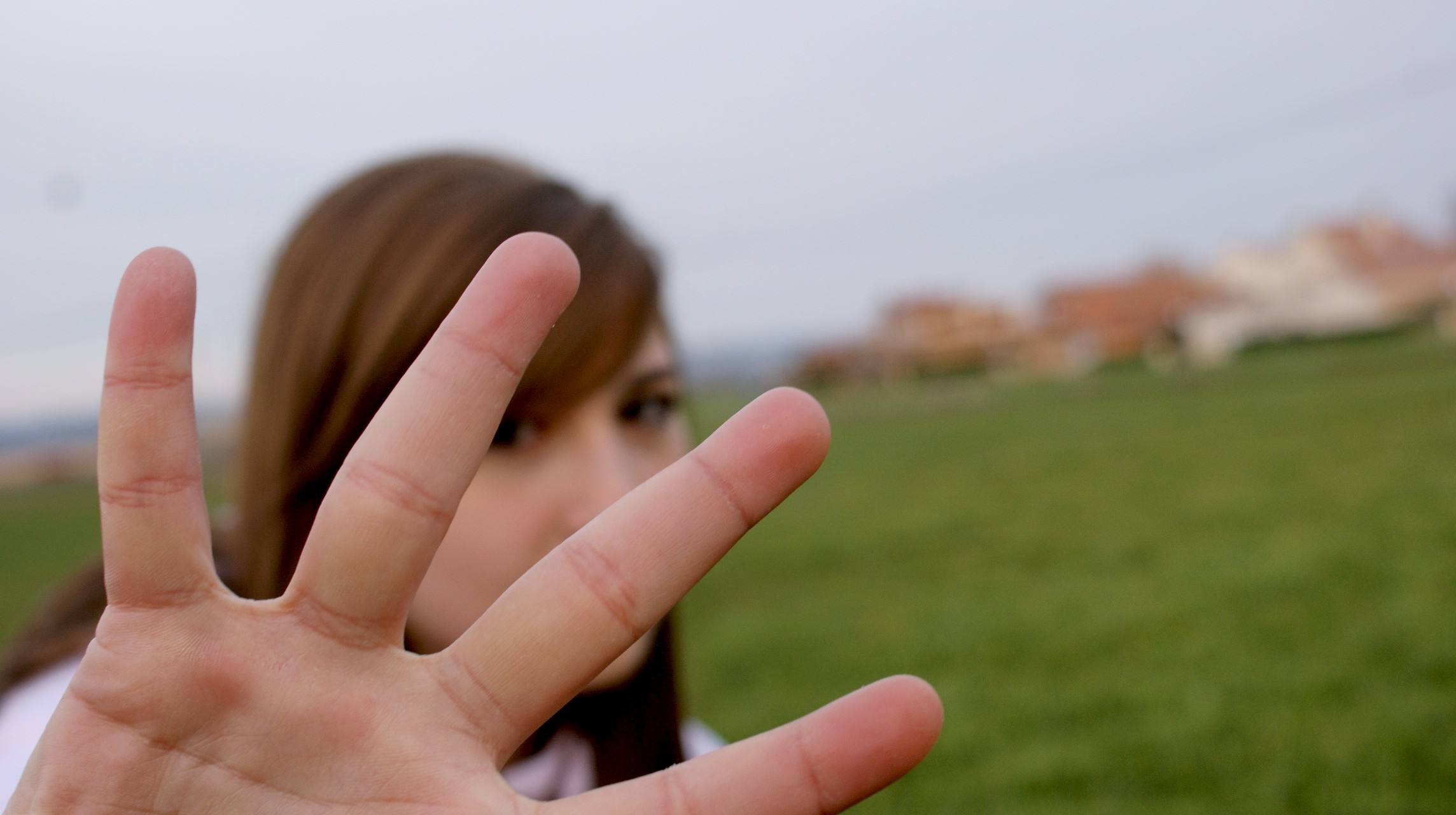 enfoque selectivo del primer plano